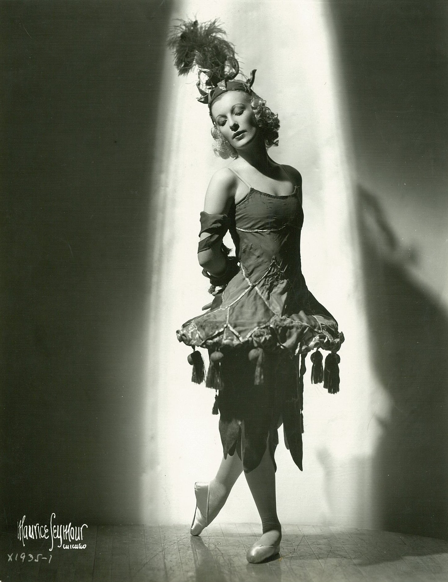 Татьяна Рябушинская артистка, балета и педагог.